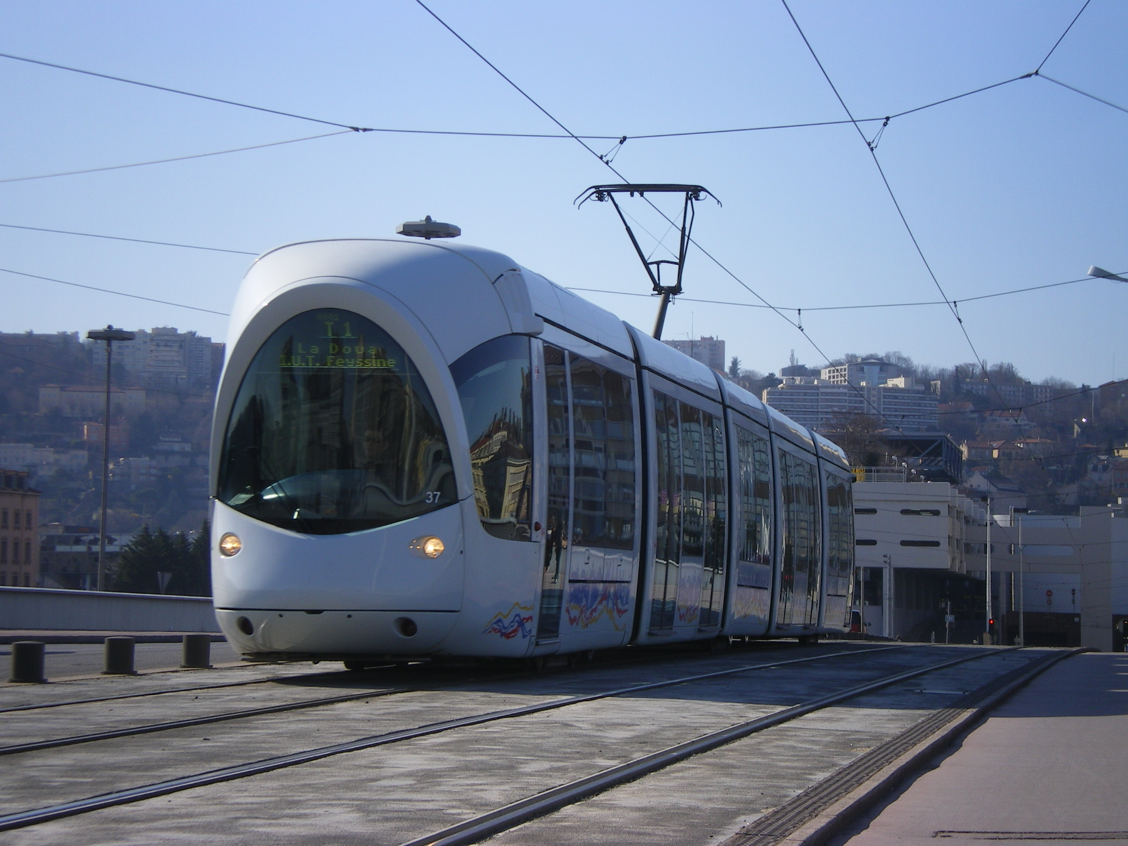 Rame Alstom Citadis TGA 302 sur la ligne T1 du réseau TCL, ici au Pont Gallieni. 14-03-2009.